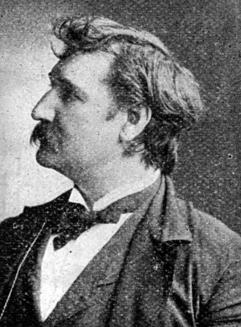 Opie Read